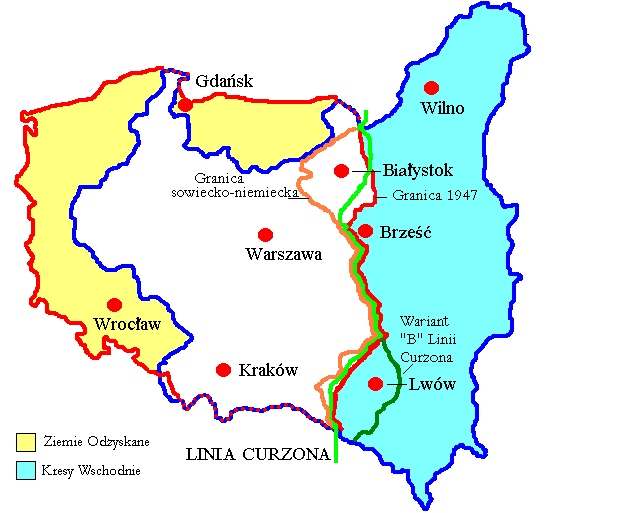 Spolszczony plik Map of Poland (1945).png z Commons